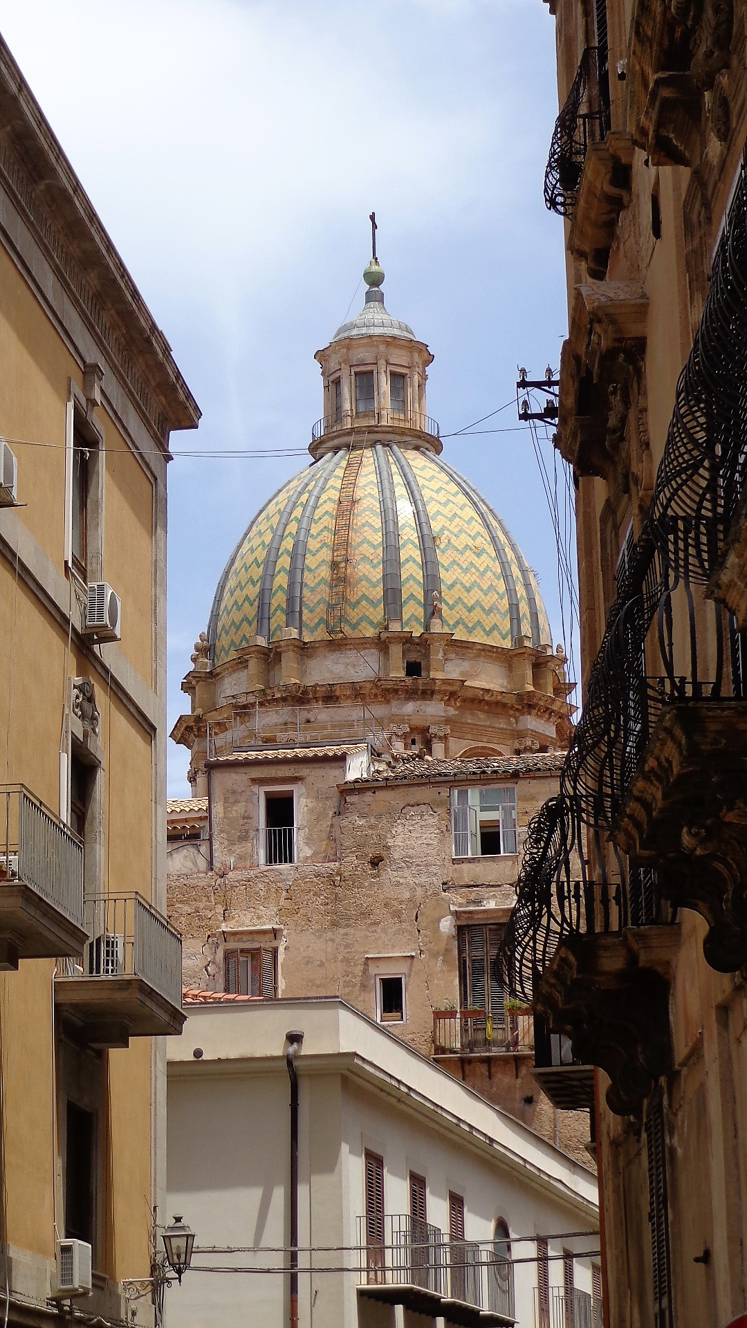 Cupola di San Giuseppe dei Teatini.